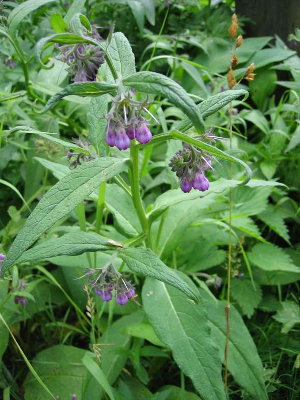 Gemeiner Beinwell in der Nähe der Bosruckhütte, Österreich